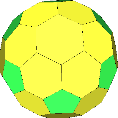 六角化五角化截角三角化四面體 的對偶多面體